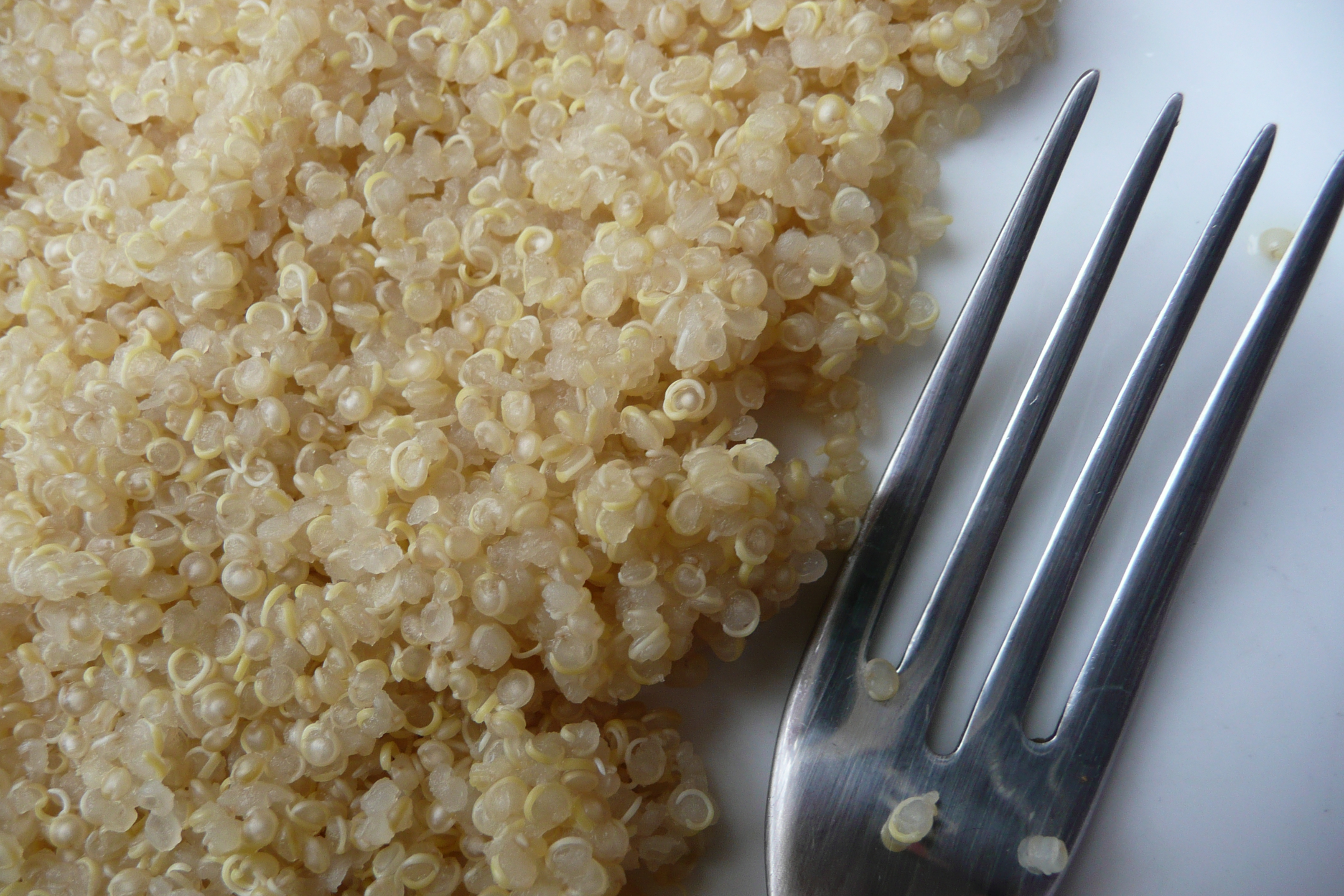 Quinoa cuit.